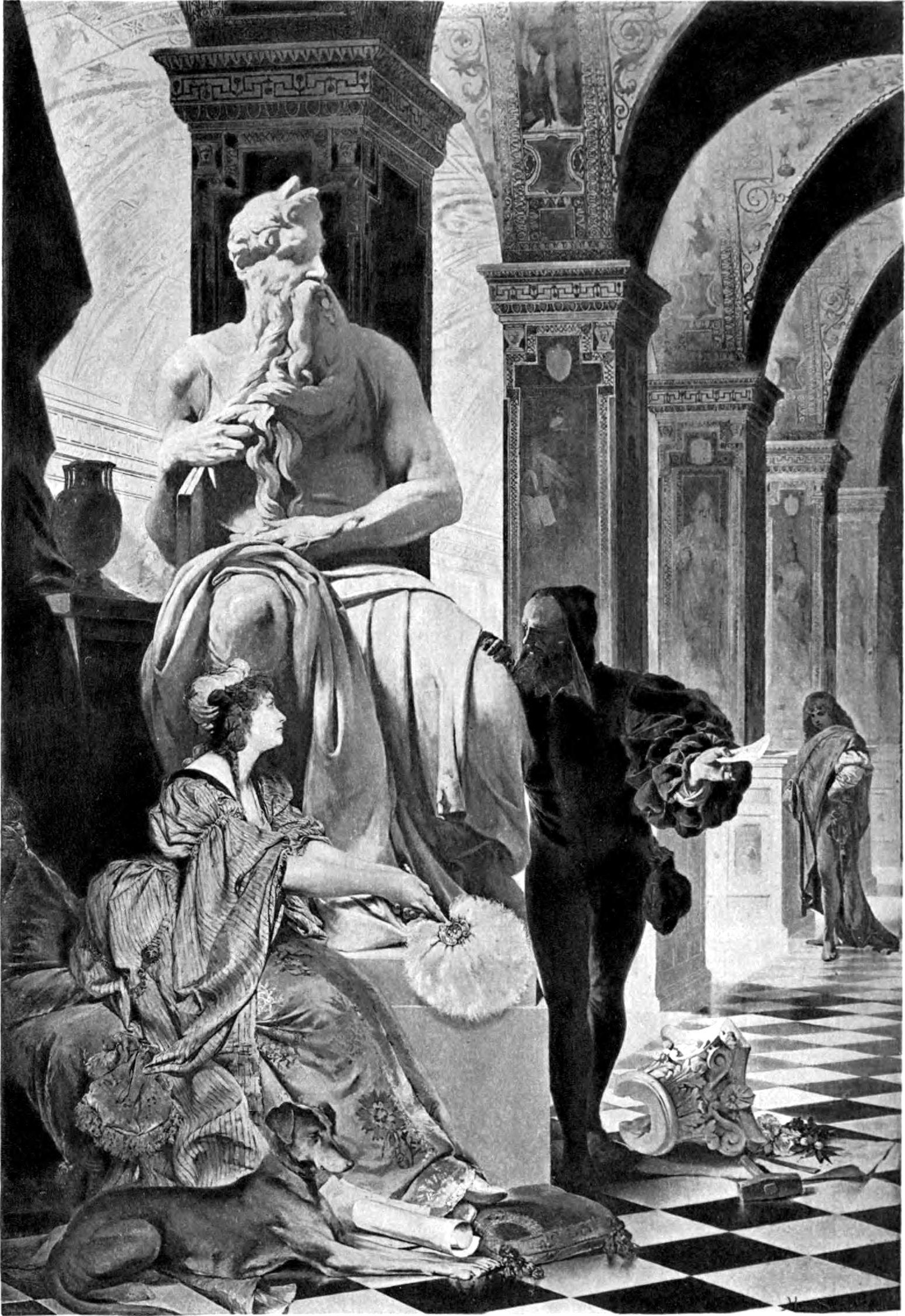 Michael Angelo and Vittoria Colonna (Schneider)